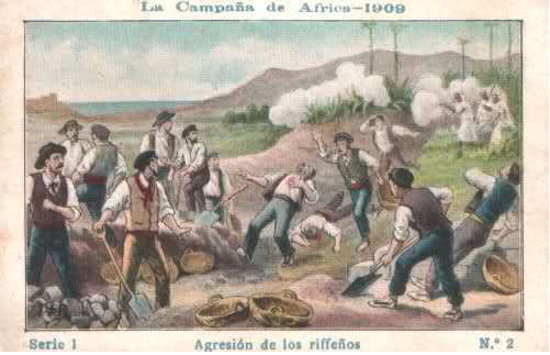 A las siete de la mañana del 9 de Julio, trece obreros de la Compañía Española de las minas del Riff, que trabajaban en la cimentación del puente sobre el arroyo de Sidi-Muza fueron atacados traidoramente por los moros. Los riffeños que se encontraban emboscados, hicieron una descarga sobre estos y ocasionaron la muerte de tres. Los demás, sorprendidos por la salvaje agresión, apelaron a la fuga; los moros volvieron a hacer fuego sobre los que huían y mataron de un balazo a uno, y a otro le ocasionaron una herida grave en el antebrazo. Por fin consiguieron tomar una locomotora de la Compañía Francesa y llegar al campo de Melilla, dando aviso del hecho al comandante militar.